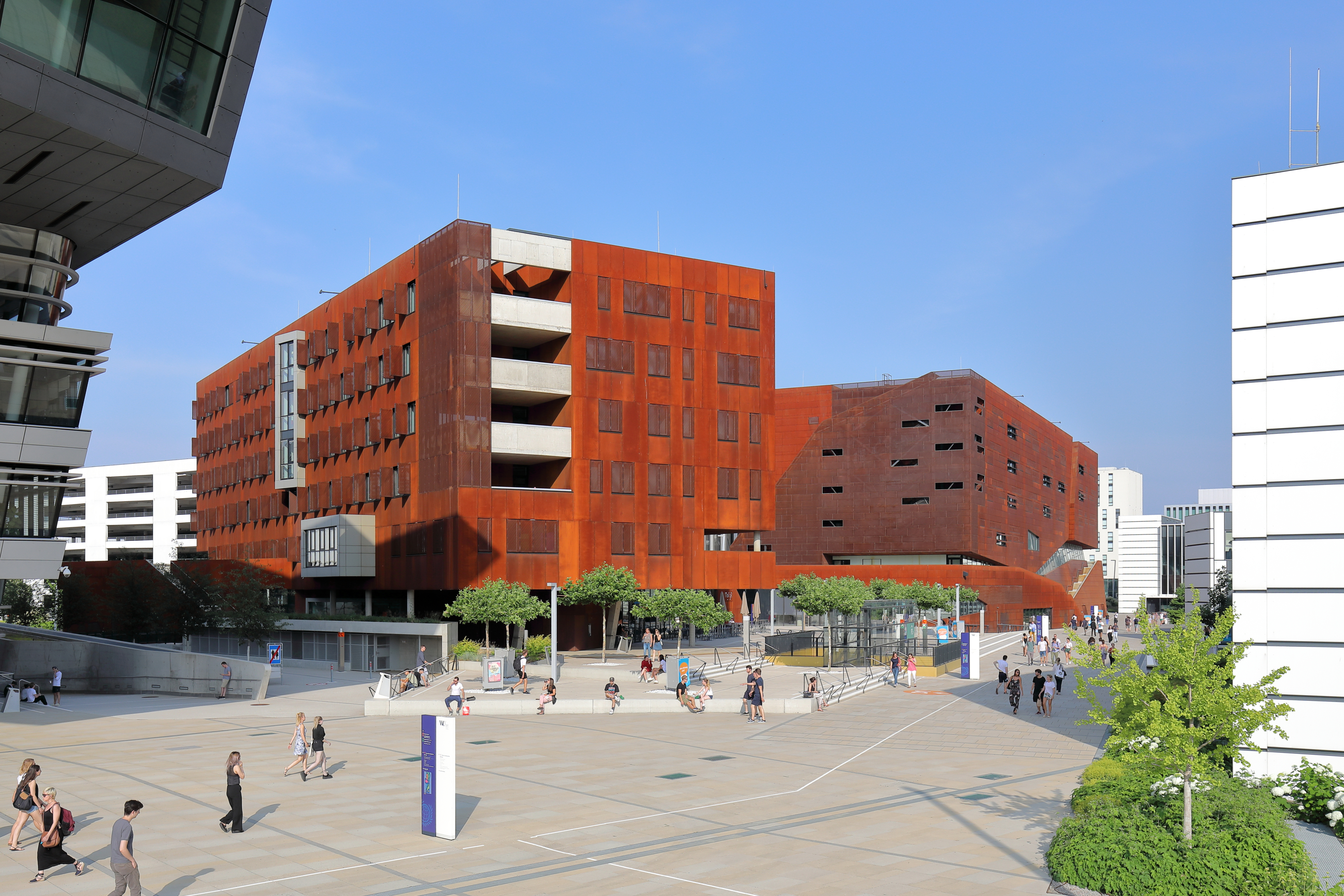 Die Gebäude „Department 1“ (D1) und „Teaching Center“ (TC) des WU Campus der Wirtschaftsuniversität im 2. Wiener Gemeindebezirk Leopoldstadt.Der Campus mit rund 35.000 m² verbauter Grundfläche und etwa 55.000 m² öffentlich zugänglicher Freifläche wurde von 2009 bis 2013 auf dem südwestlichen Teil des einstigen Weltausstellungs- und späteren Messegeländes am Nordostrand des Wiener Praters um rund eine halbe Milliarde Euro errichtet. D1 & TC plante das Architektenkollektiv BUSarchitektur unter der Leitung von Laura P. Spinadel. Die Fassade der Gebäude besteht aus Cortenstahl.